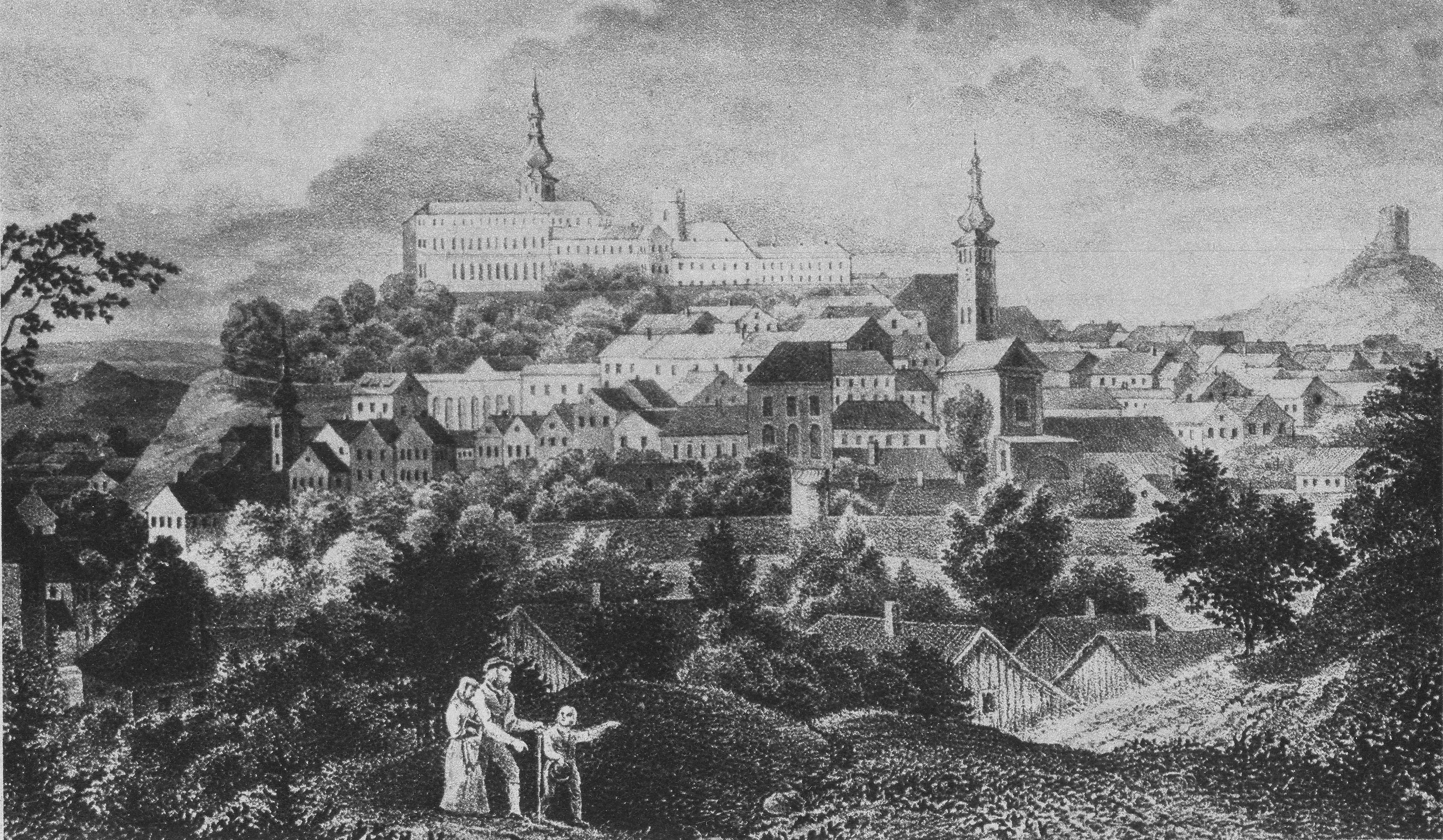 Zámek Mikulov v roce 1848, rytina Františka Alexandra Hebera.